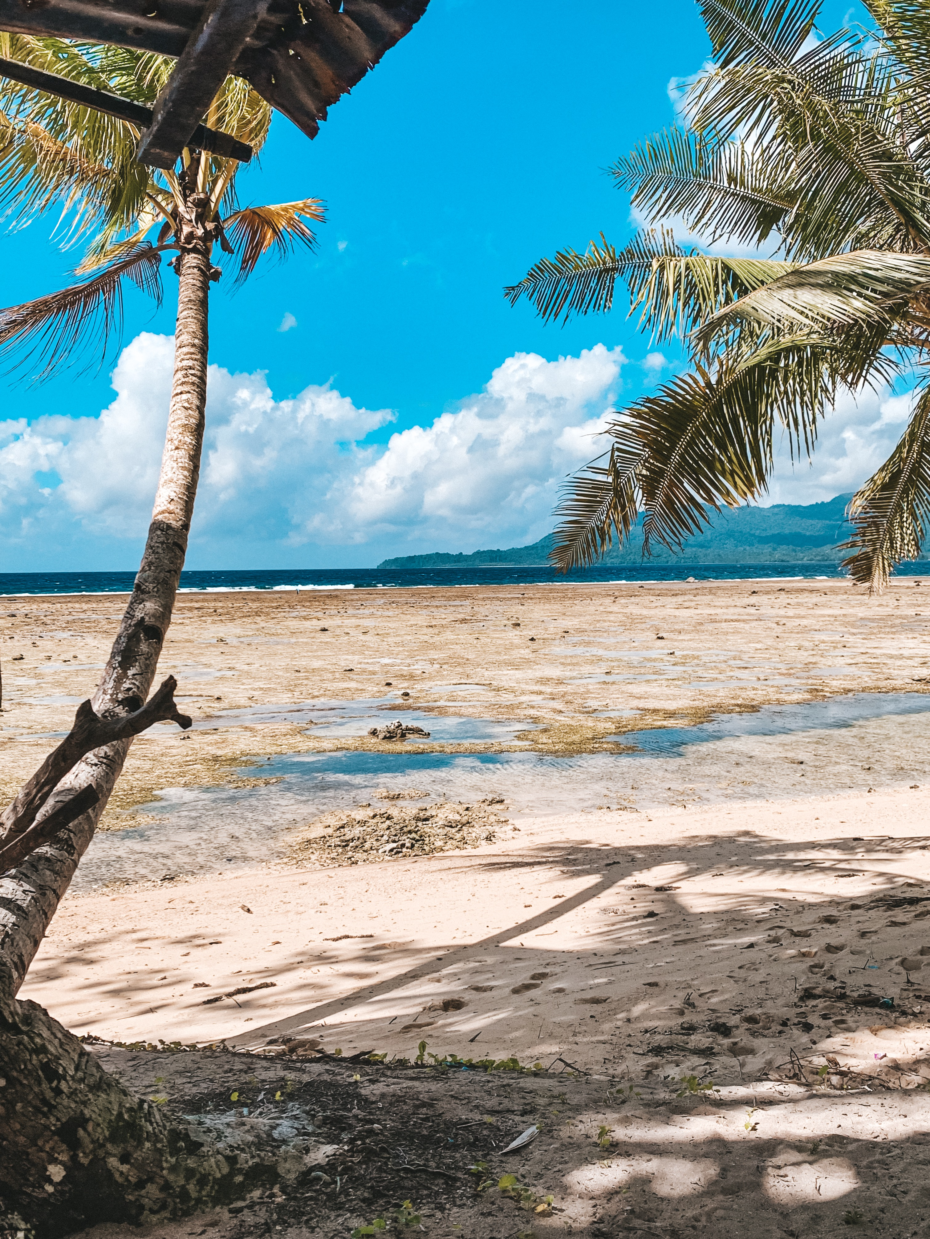 Pemandangan dari salah satu sudut Pantai Pariem